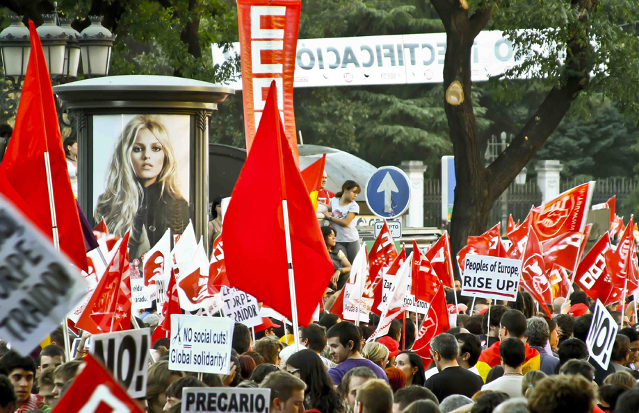 Huelga general en España. Manifestantes en el Paseo de la Castellana, Madrid, 29 de septiembre de 2010.